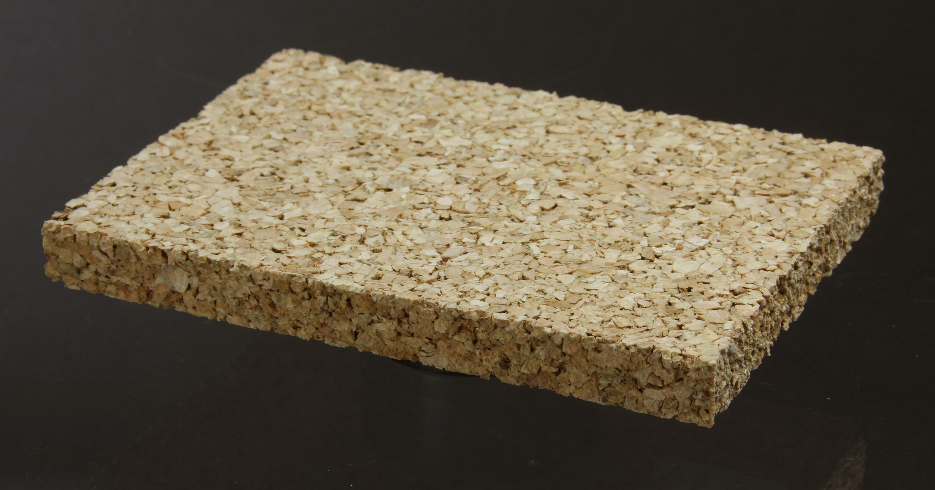 Korkplatte